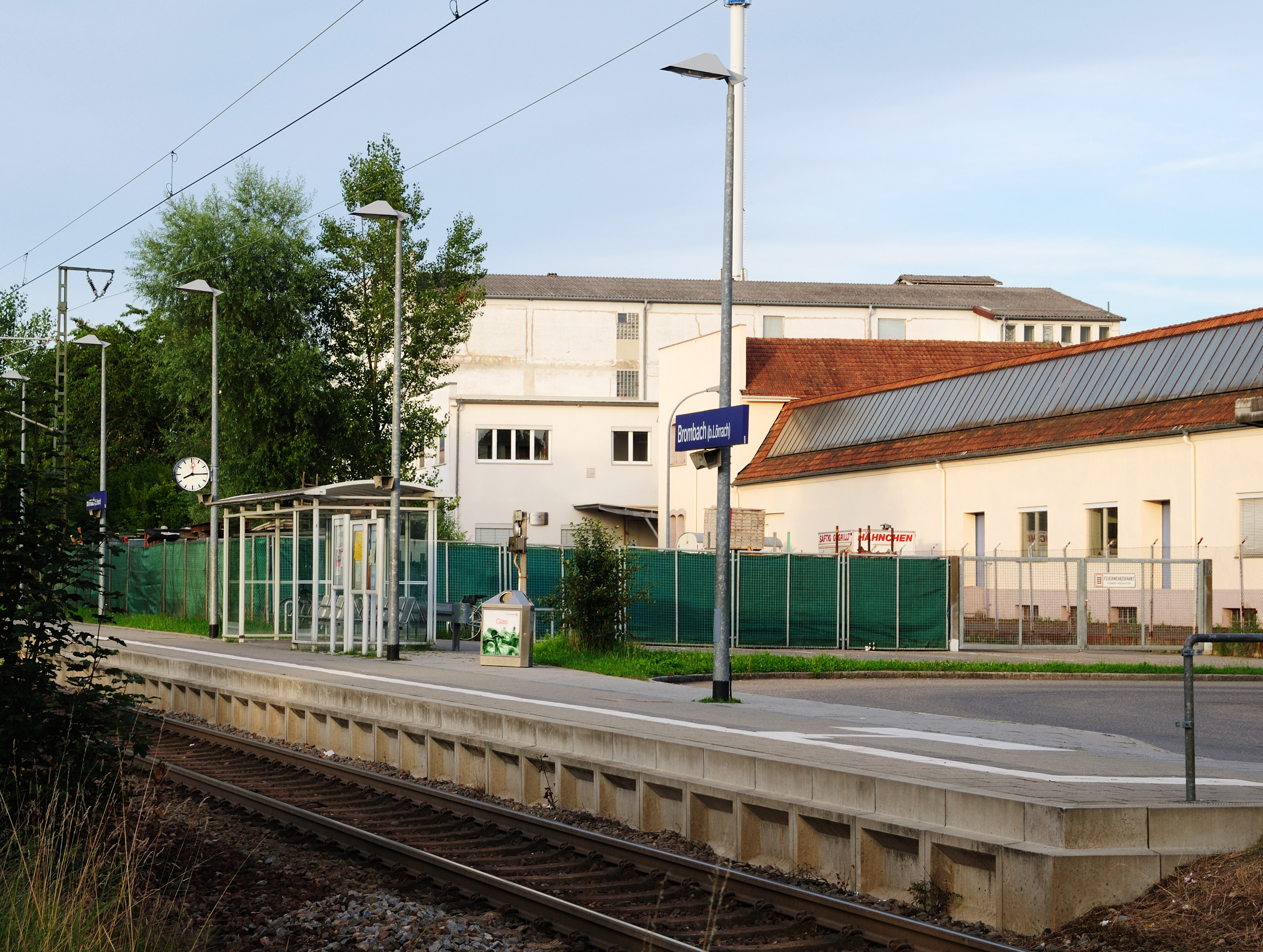 Brombach: S-Bahn-Haltestelle